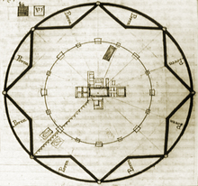 Filarete's nicht ausgeführter Plan für die Idealstadt der Renaissance